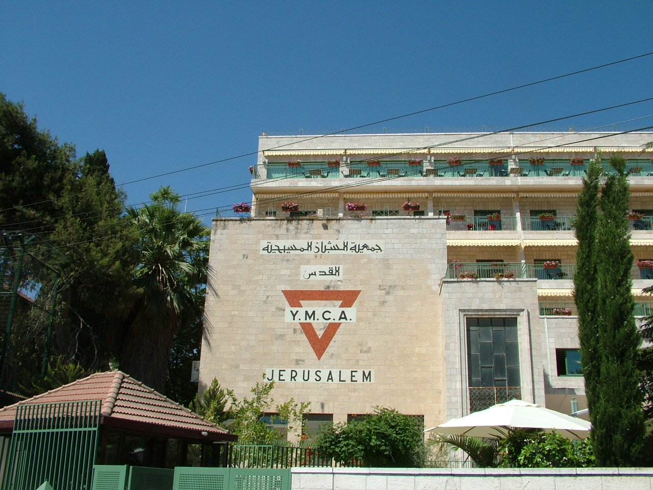 צולם במסגרת מיזם אלף מילים (he:ויקיפדיה:מיזמי ויקיפדיה/אלף מילים/טיול ירושלים - מזרח ירושלים)